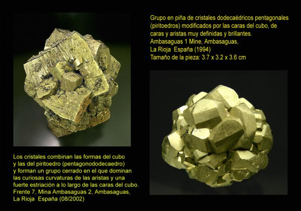 Pirita de Ambas Aguas